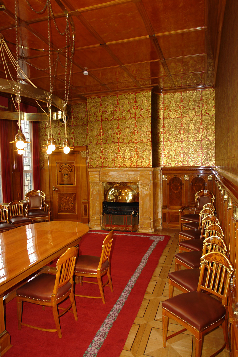 Rathaus in Bremen. Die Güldenkammer in der Oberen Halle, designed by Heinrich Vogeler.